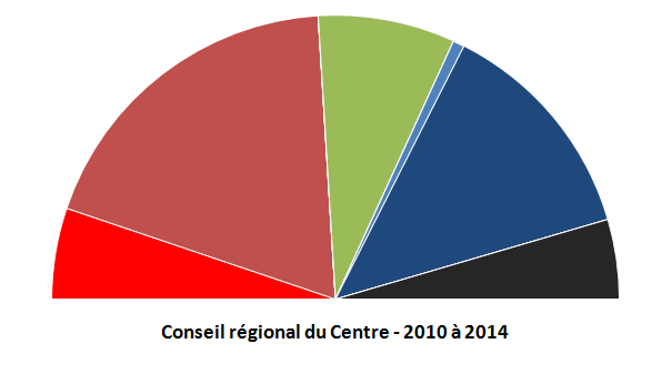 Conseil régional du Centre en 2010